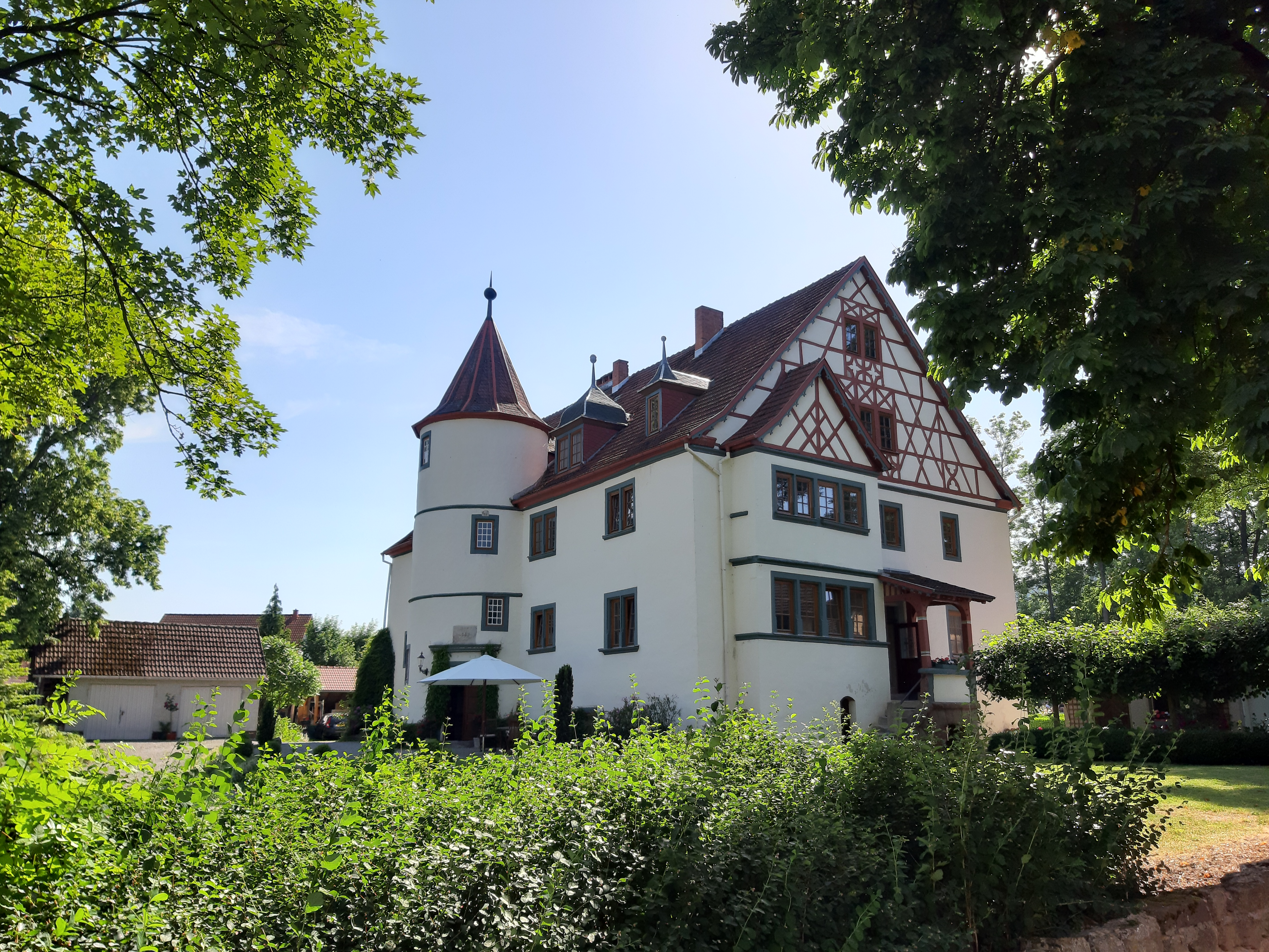 Roßdorf, Thüringen, Geysosches Schloss